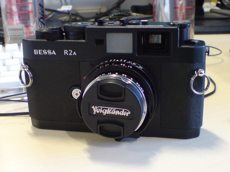 Voigtlanger Bessa 35mm